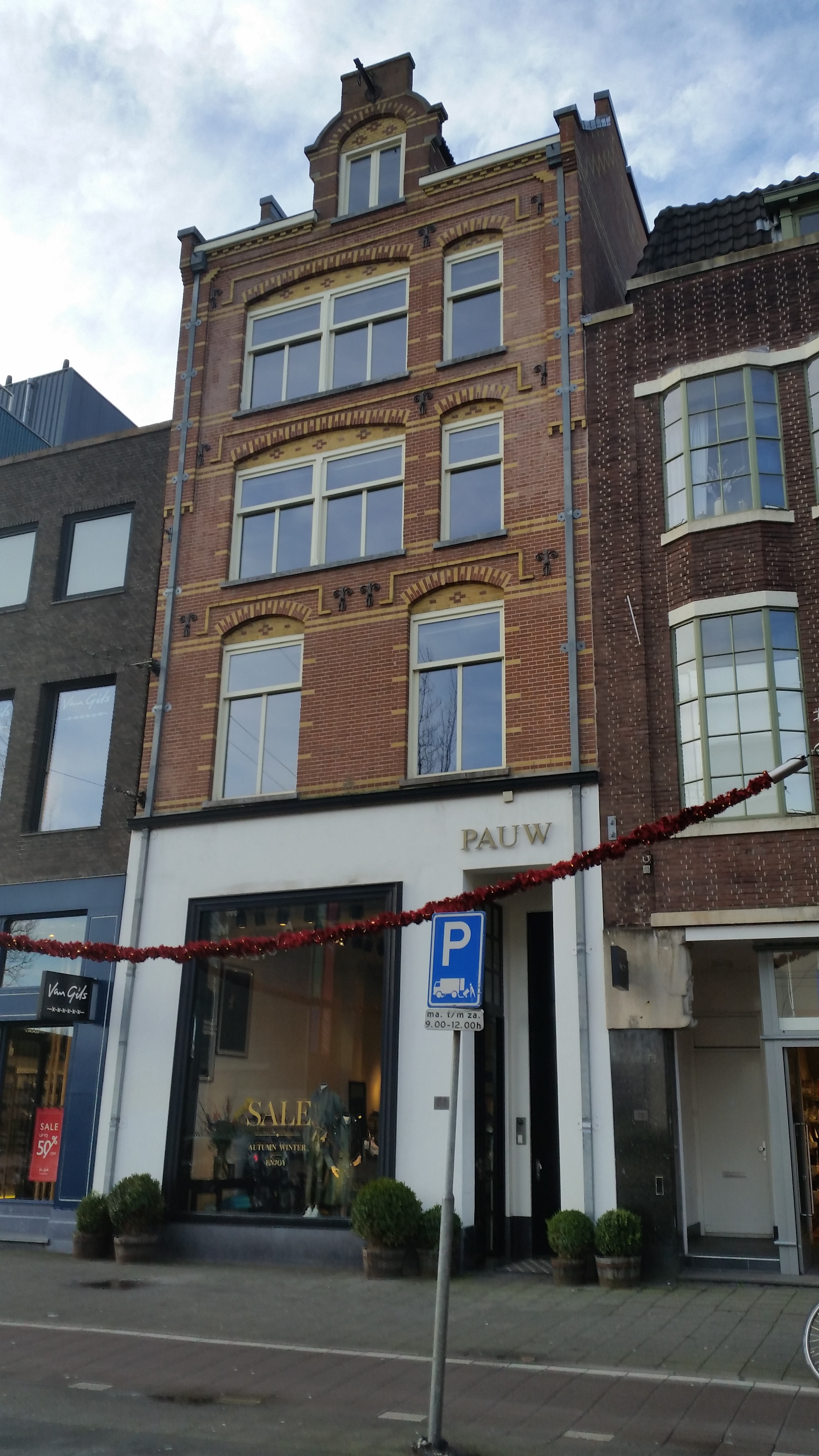 Van Baerlestraat 72, verbouwd gebouw van architect Berlage